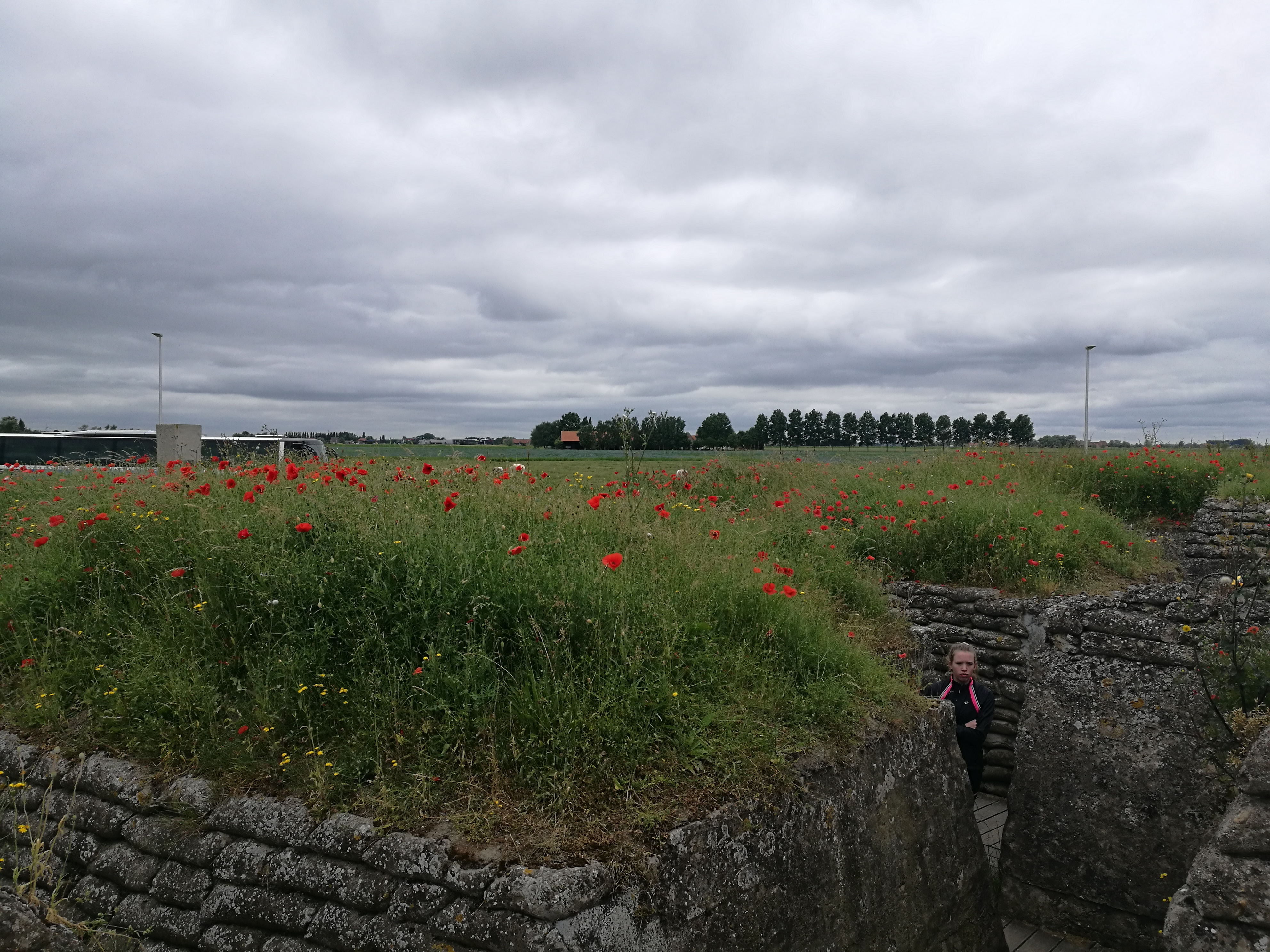 Poppies tussen de loopgraven, Dodengang, Ijzerdijk 62 8600 Diksmuide This photo of immovable heritage has been taken in the Flemish Region